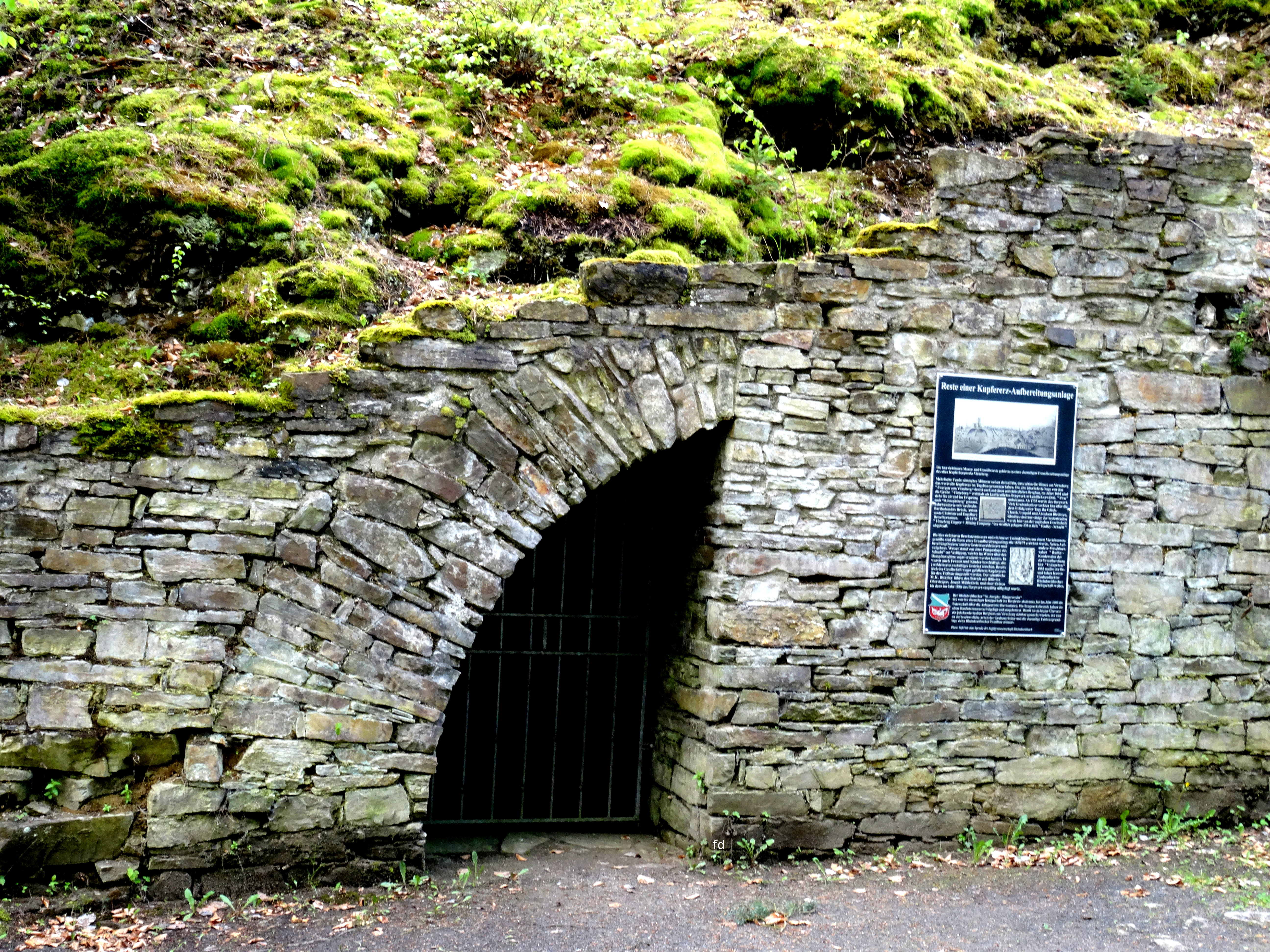 Ehemalige Erzaufbereitungsanlage am Virneberg in Rheinbreitbach. (Rheinbreitbach liegt im Naturpark Rhein-Westerwald)